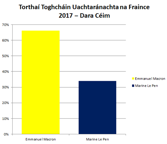 Torthaí Toghcháin Uarachtánachta na Fraince 2017 - Dara Céim